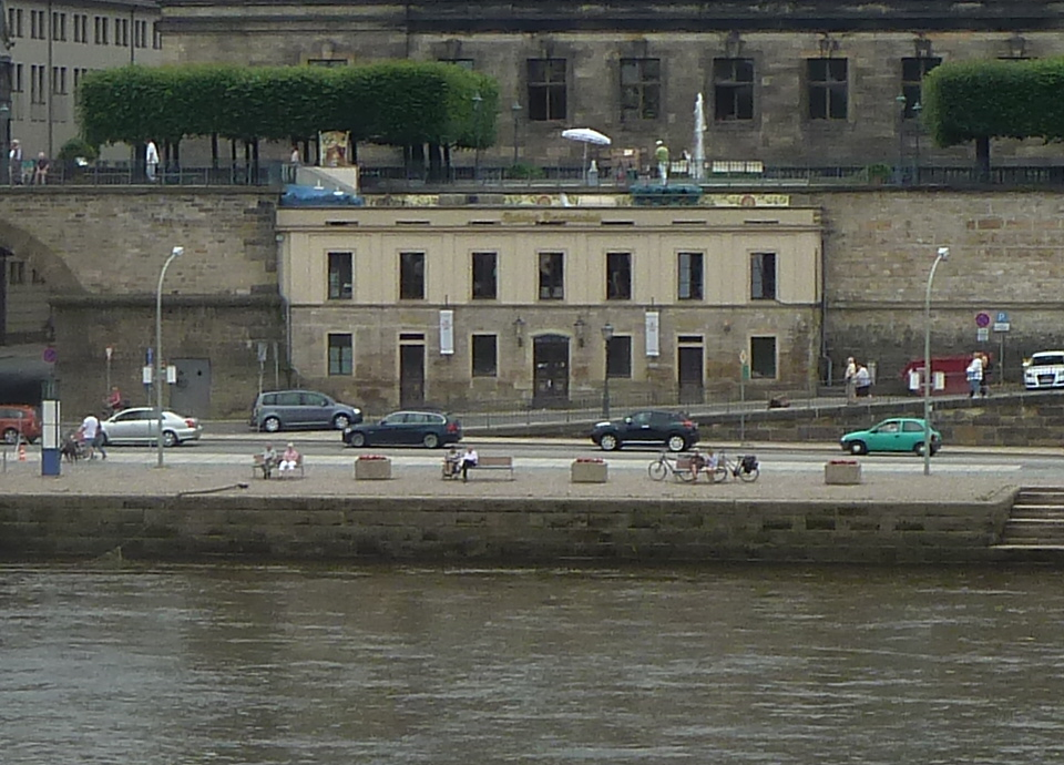 Dresdner Schiffahrtsgebäude nach dem Elbhochwasser 2013